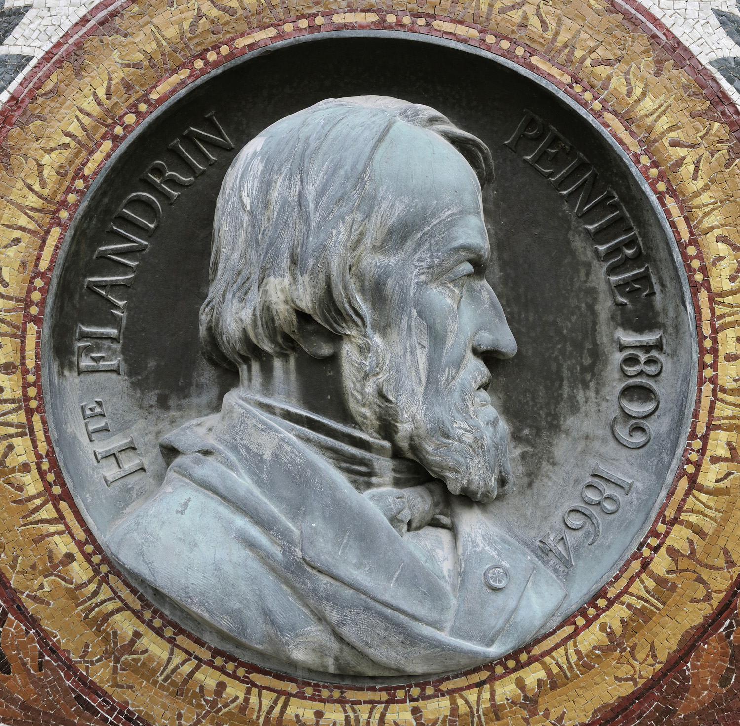 Médaillon à l'effigie d'Hippolyte Flandrin, Joseph-Hugues Fabisch